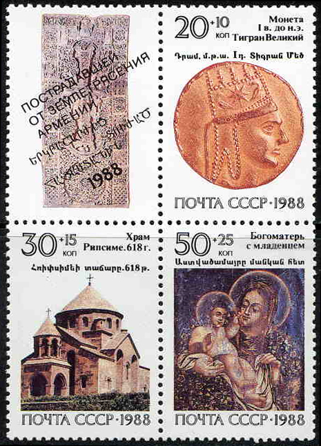 Почтово-благотворительные марки СССР. Реликвии армянского народа, 1988